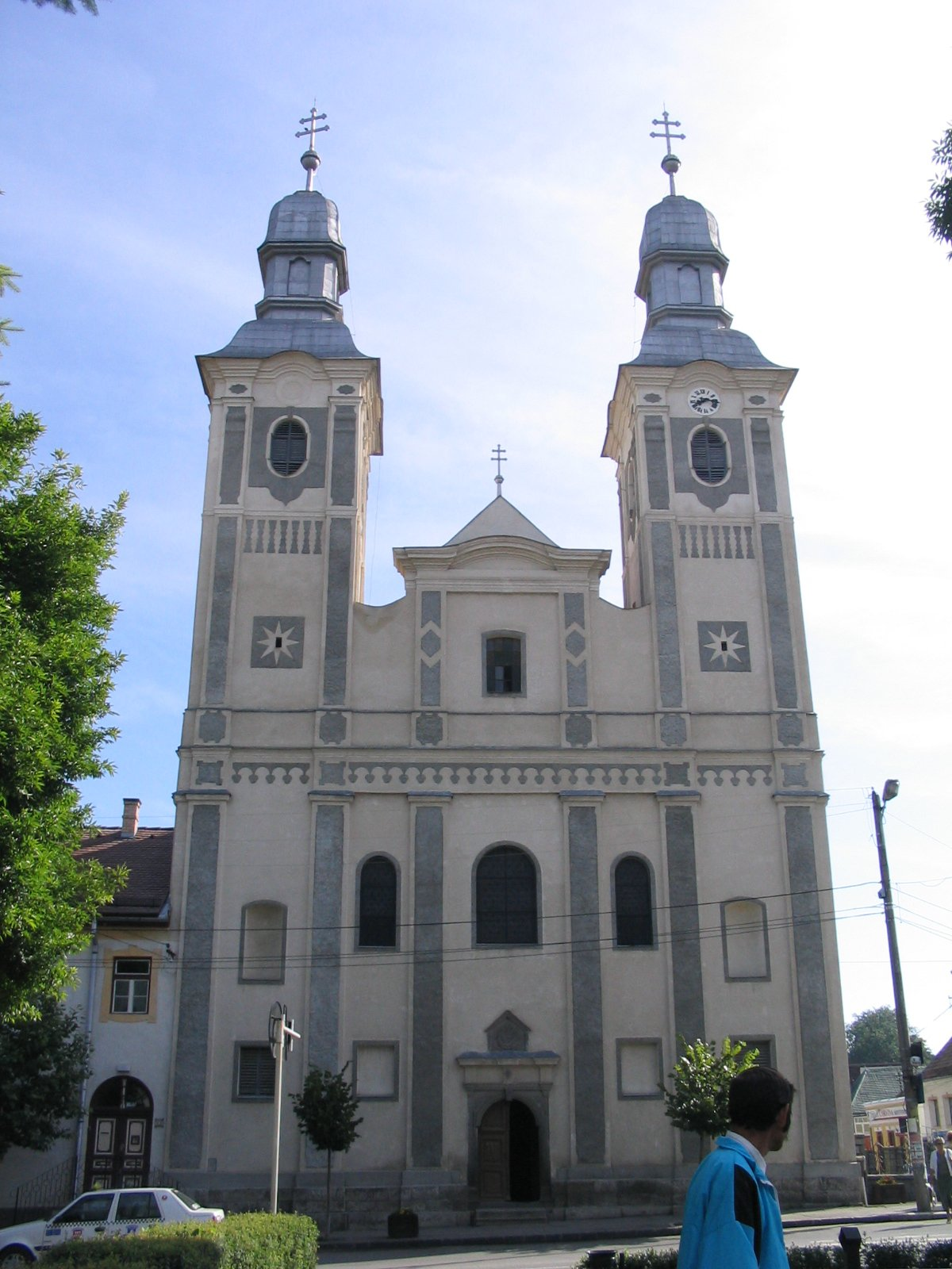 Katolik Church in Odorheiu Secuiesc 01